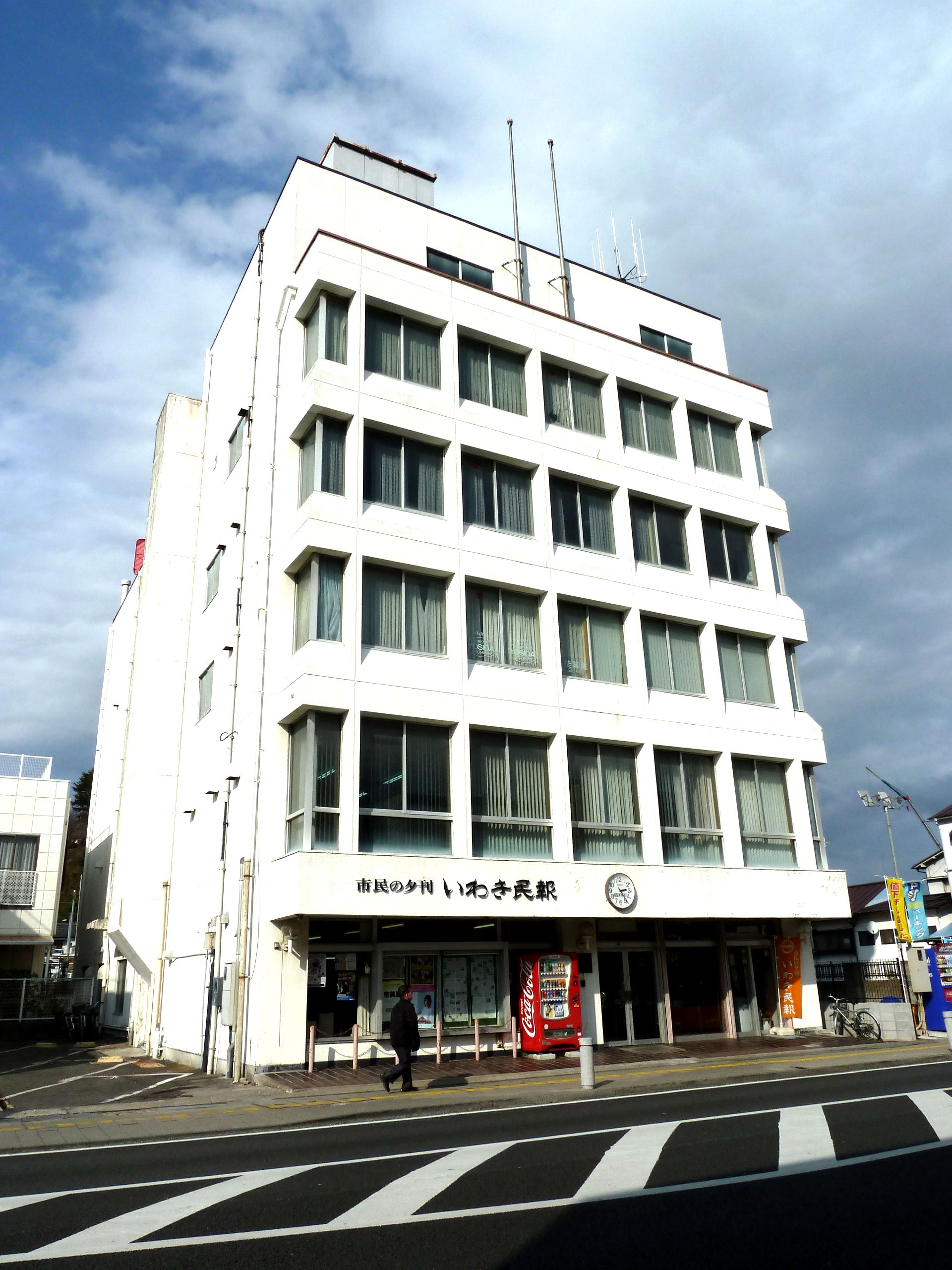 いわき民報社本社